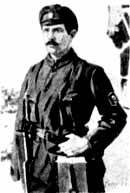 Юлиус Куперьянов (1894—1919) — офицер Русской имераторской армии, эстонский военный деятель, лейтенант, командир крупного партизанского формирования, воевавшего против большевиков в Эстонии.